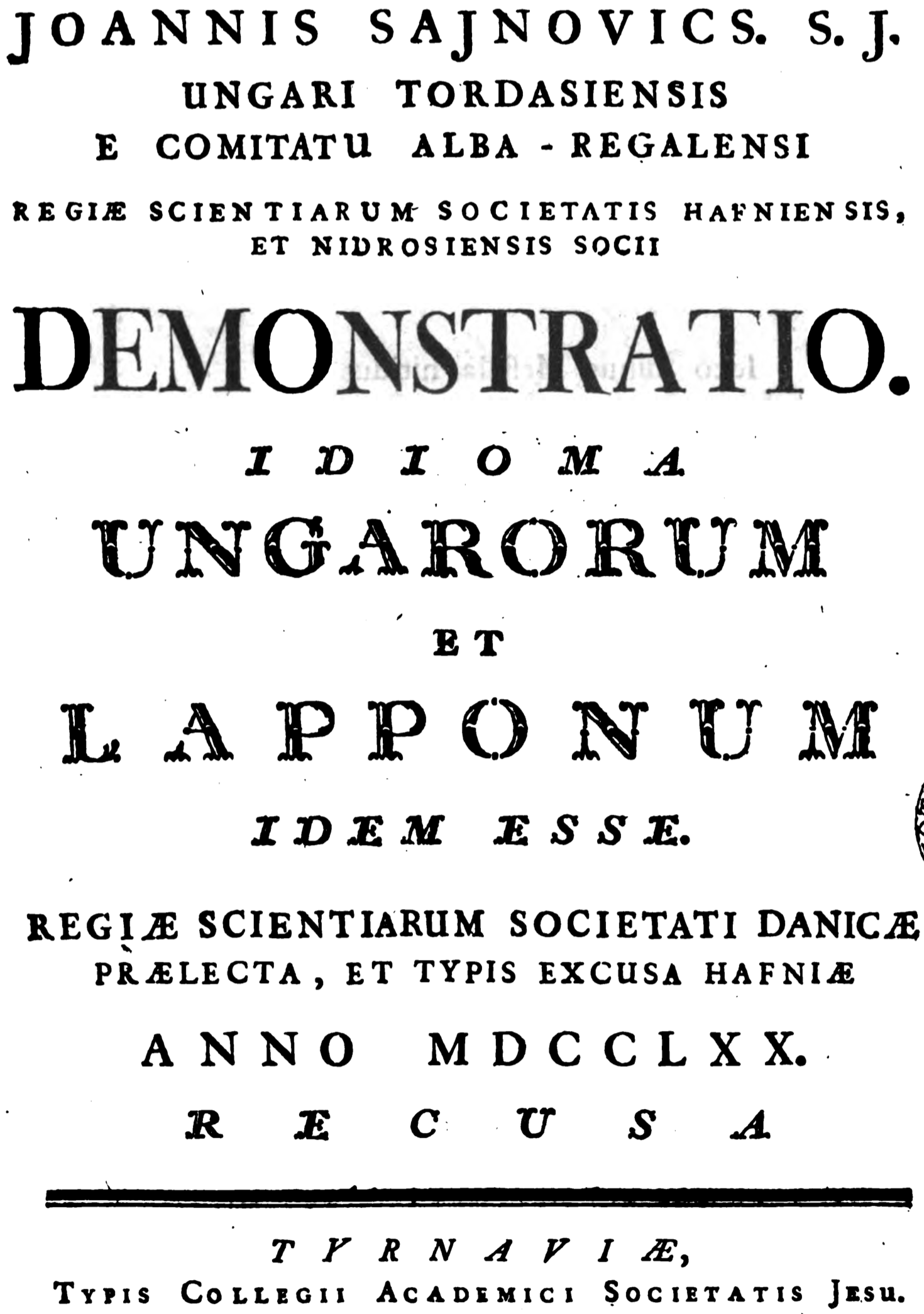 Tittelbladet til "Demonstratio idioma ungarorum et lapponum idem esse frå 1770